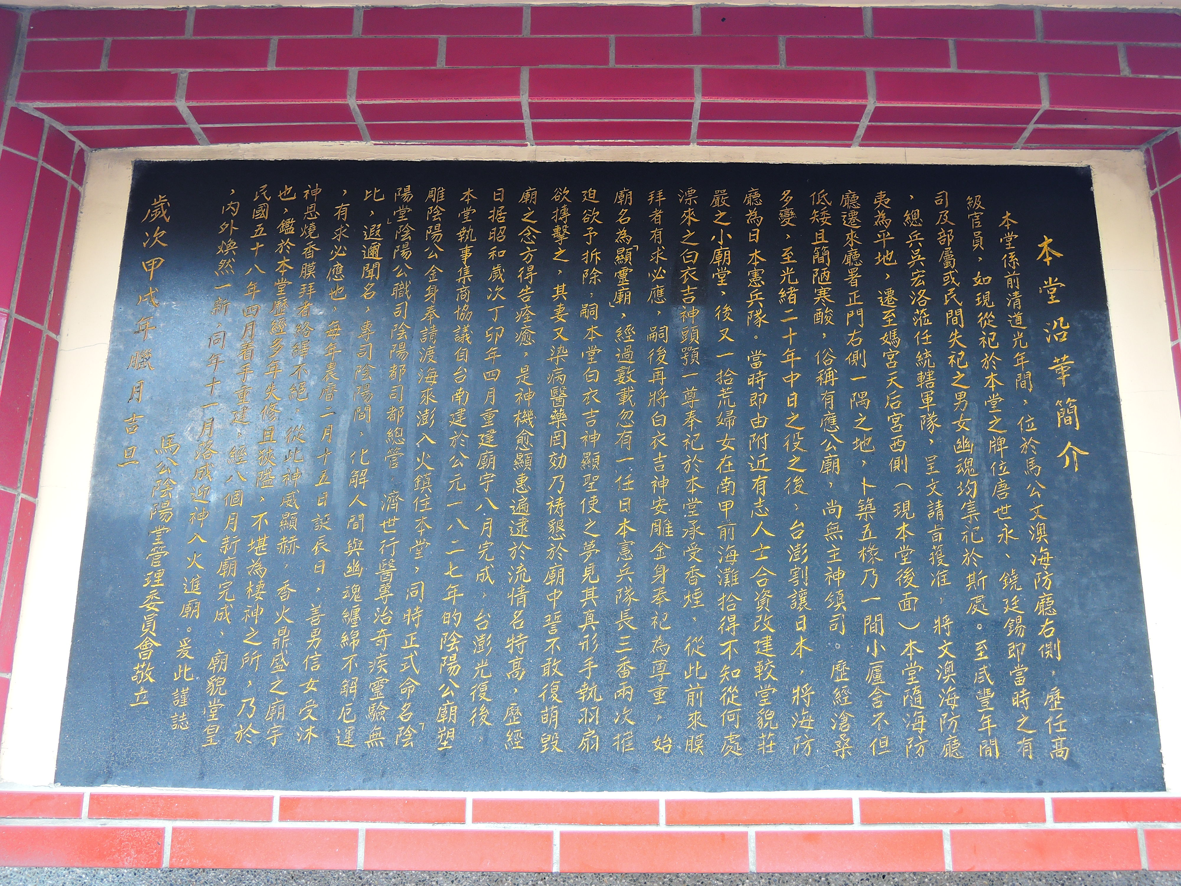 陰陽堂，沿革碑文